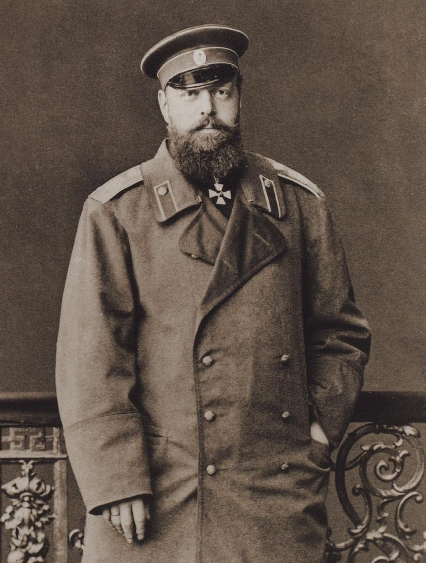 Tsar Alexander III of Russia